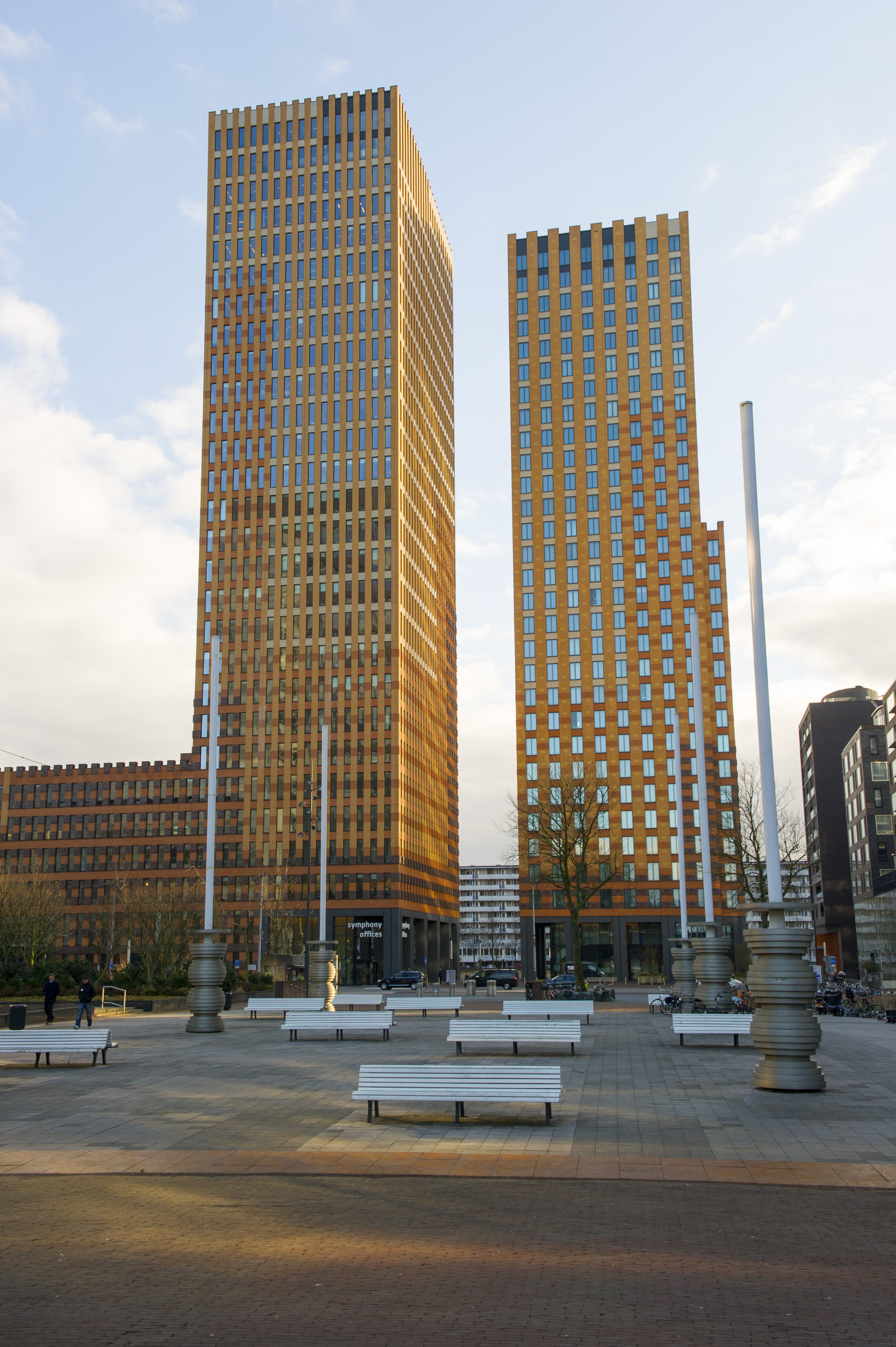 Zuidas Campus Duisenberg school of finance